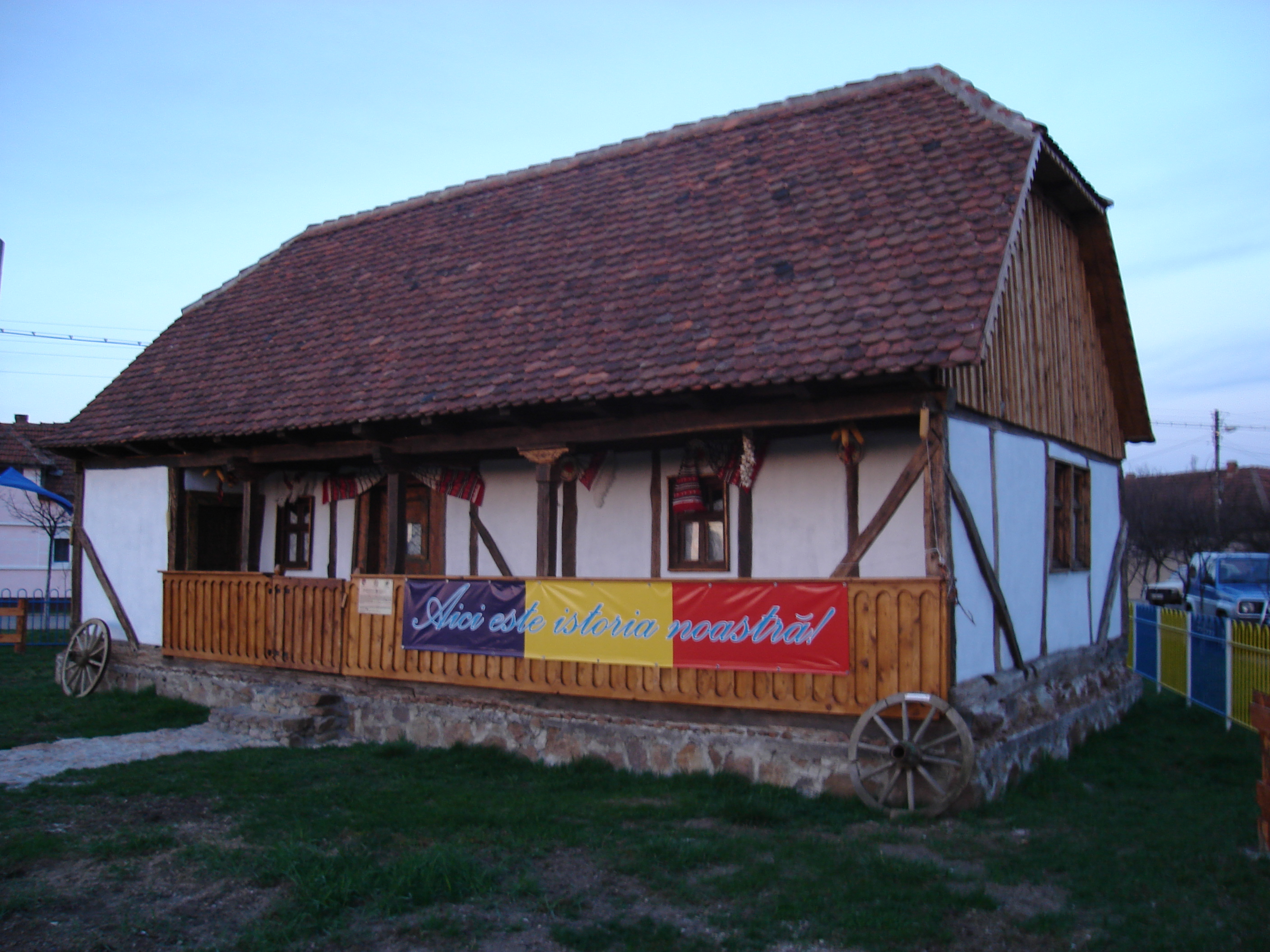 Muzeul Ţăranului Român din Salonta